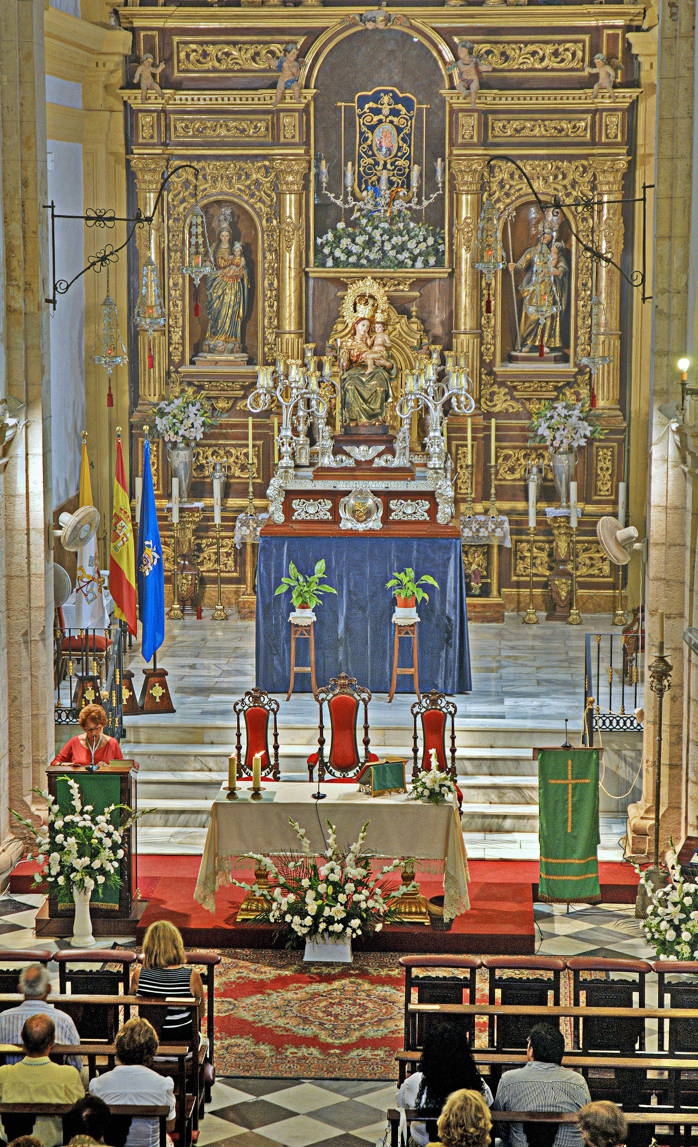 Momentos